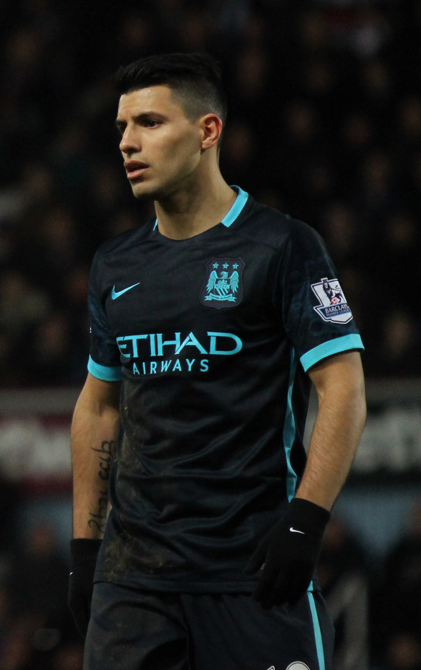 Sérgio Agüero atuando contra o West Ham